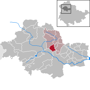 Bothenheilingen in Thuringia - Unstrut-Hainich-Kreis